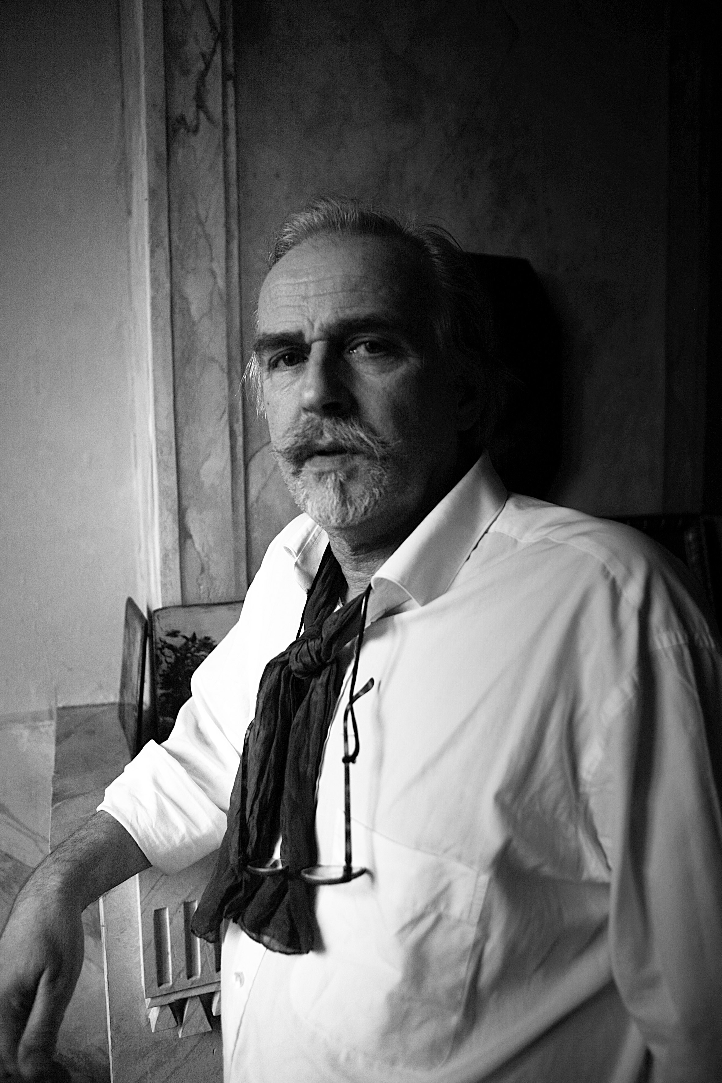 Portreit van Eugène Peters